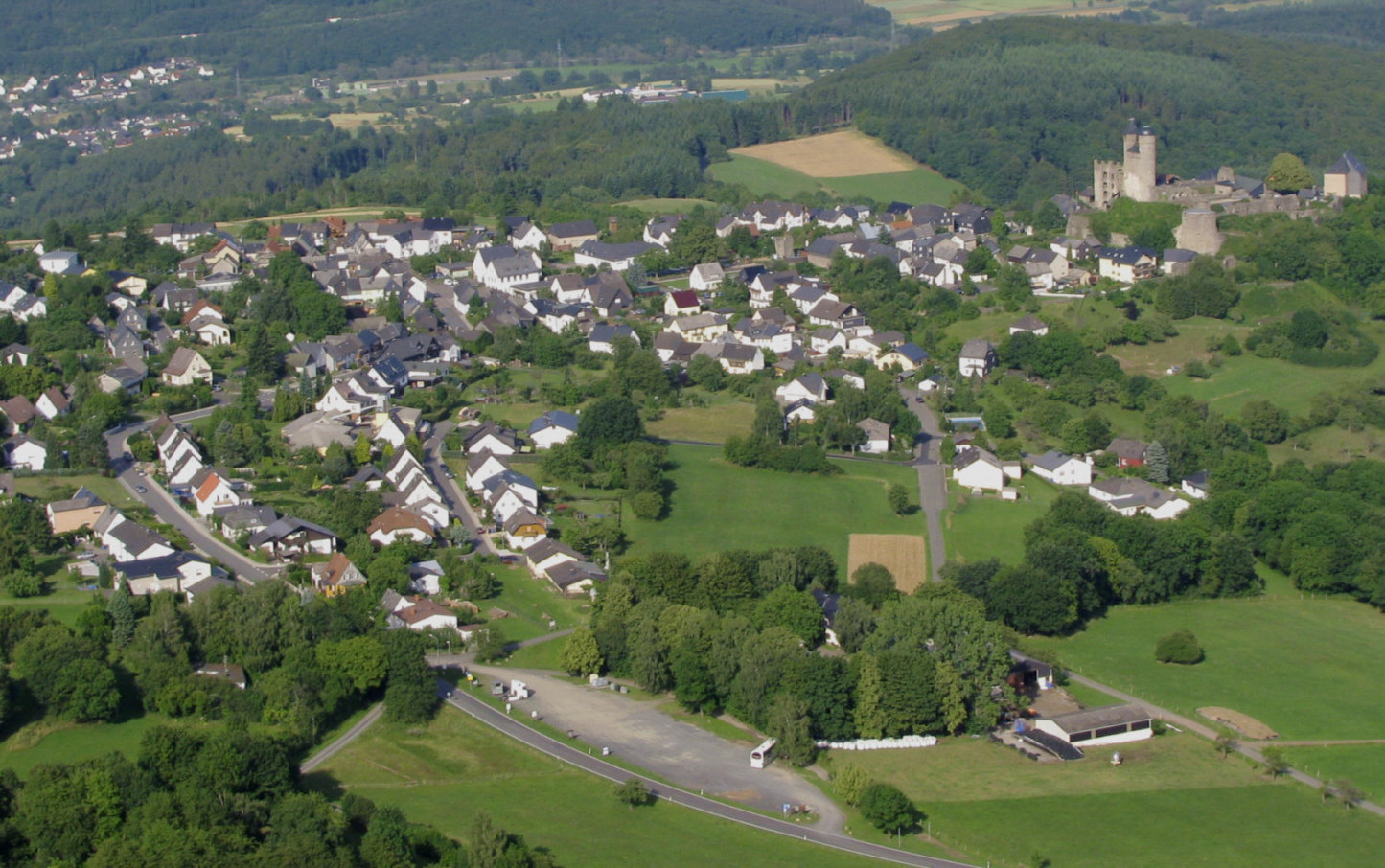 Greifenstein (inkl. Burg) aus der Luft